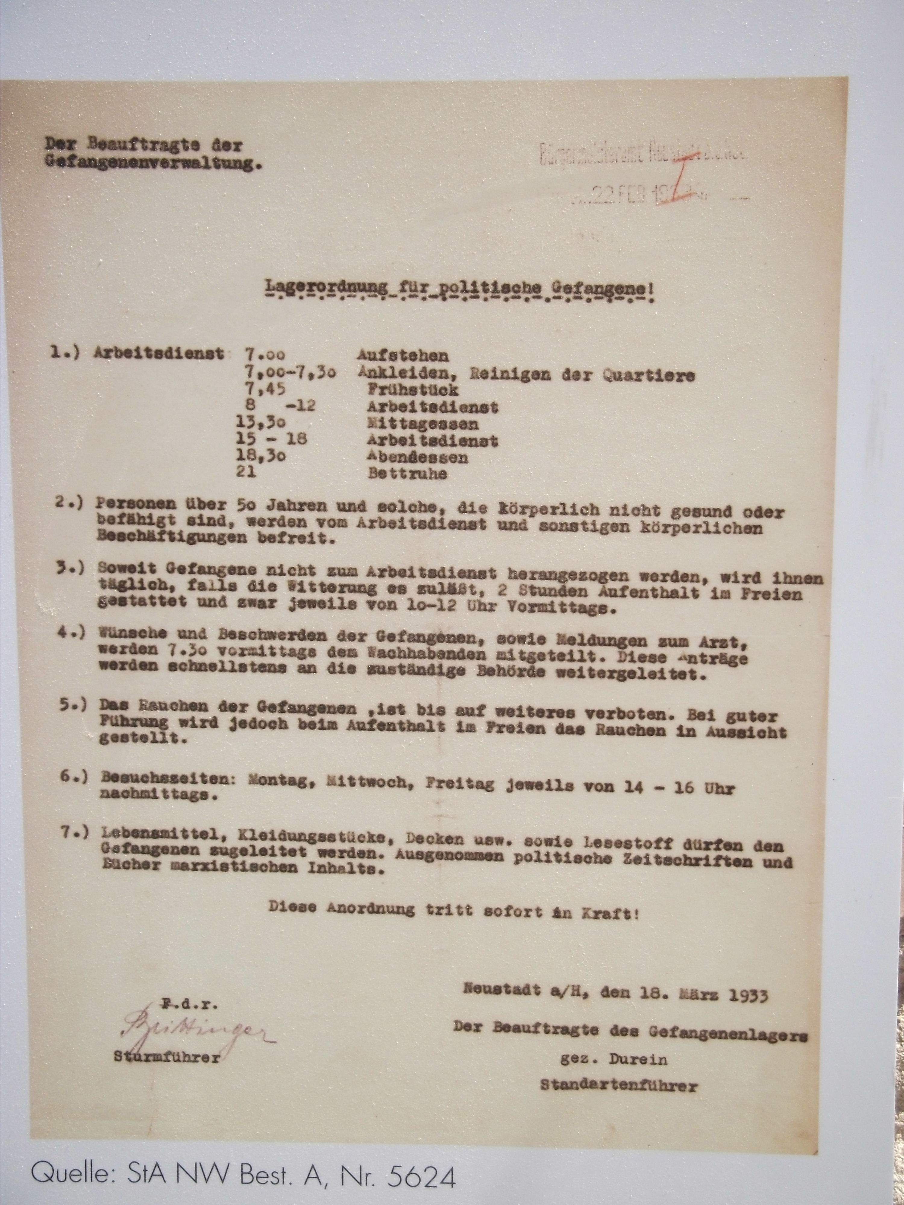 Infotafel des Foerdervereins Gedenkstaette mit Reproduktion der Lagerordnung des "fruehen Konzentrationslagers" in Neustadt an der Weinstraße, Datierung 18. März 1933, aus dem Stadtarchiv.Gez. Durein = Adam Durein (1893 Mechtersheim - Mainz 1948)